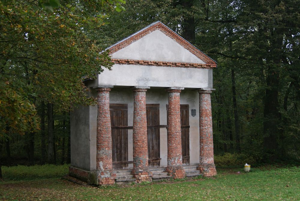 Сядзіба Агінскіх у Залессі пасля рэстаўрацыі